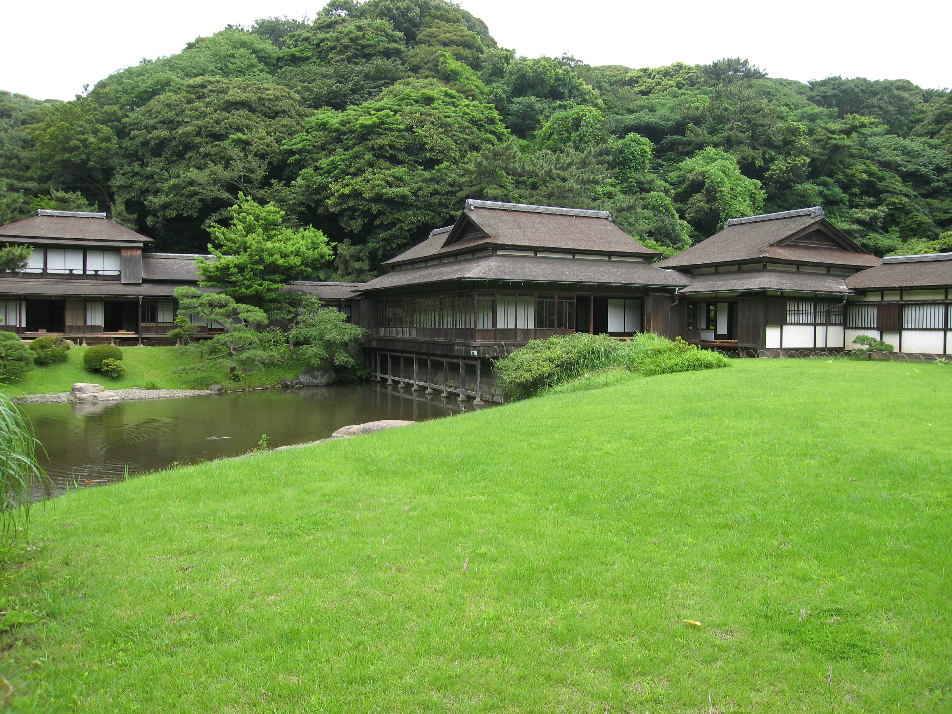 "Rinshunkaku"at Sankeien, Yokohama, Japan